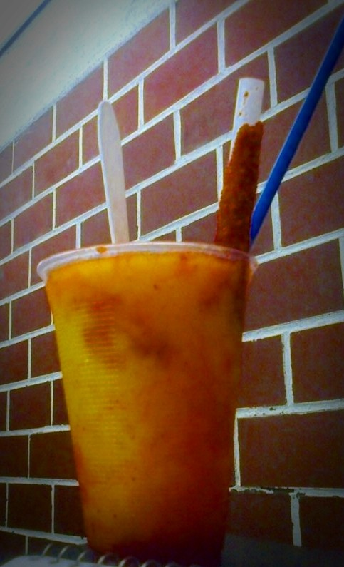 Chamoyada de Mango con Paleta de Tamarindo